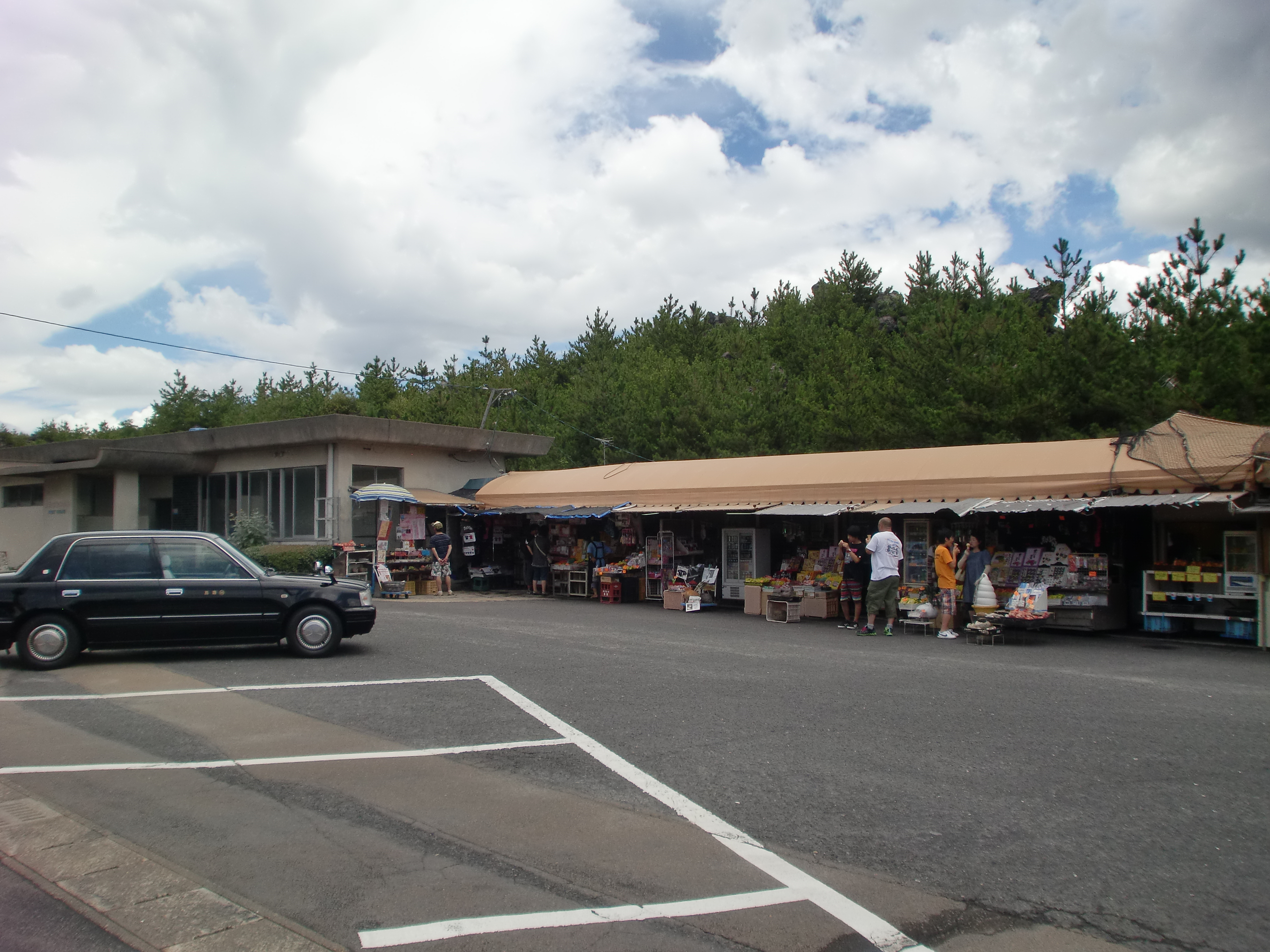 有村溶岩展望所の休憩施設及び売店。